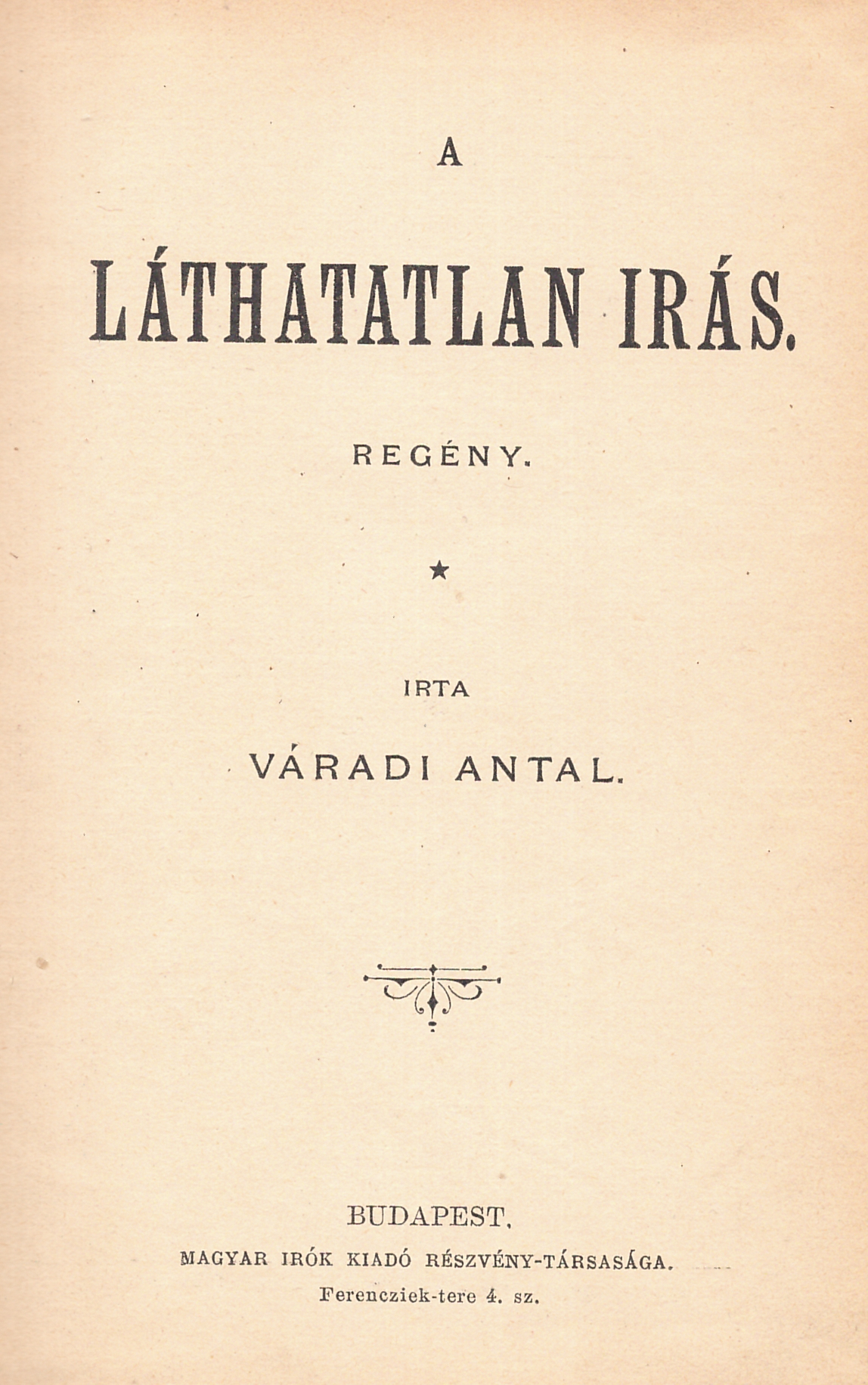 Váradi Antal (1854-1923): A láthatatlan írás (1905)